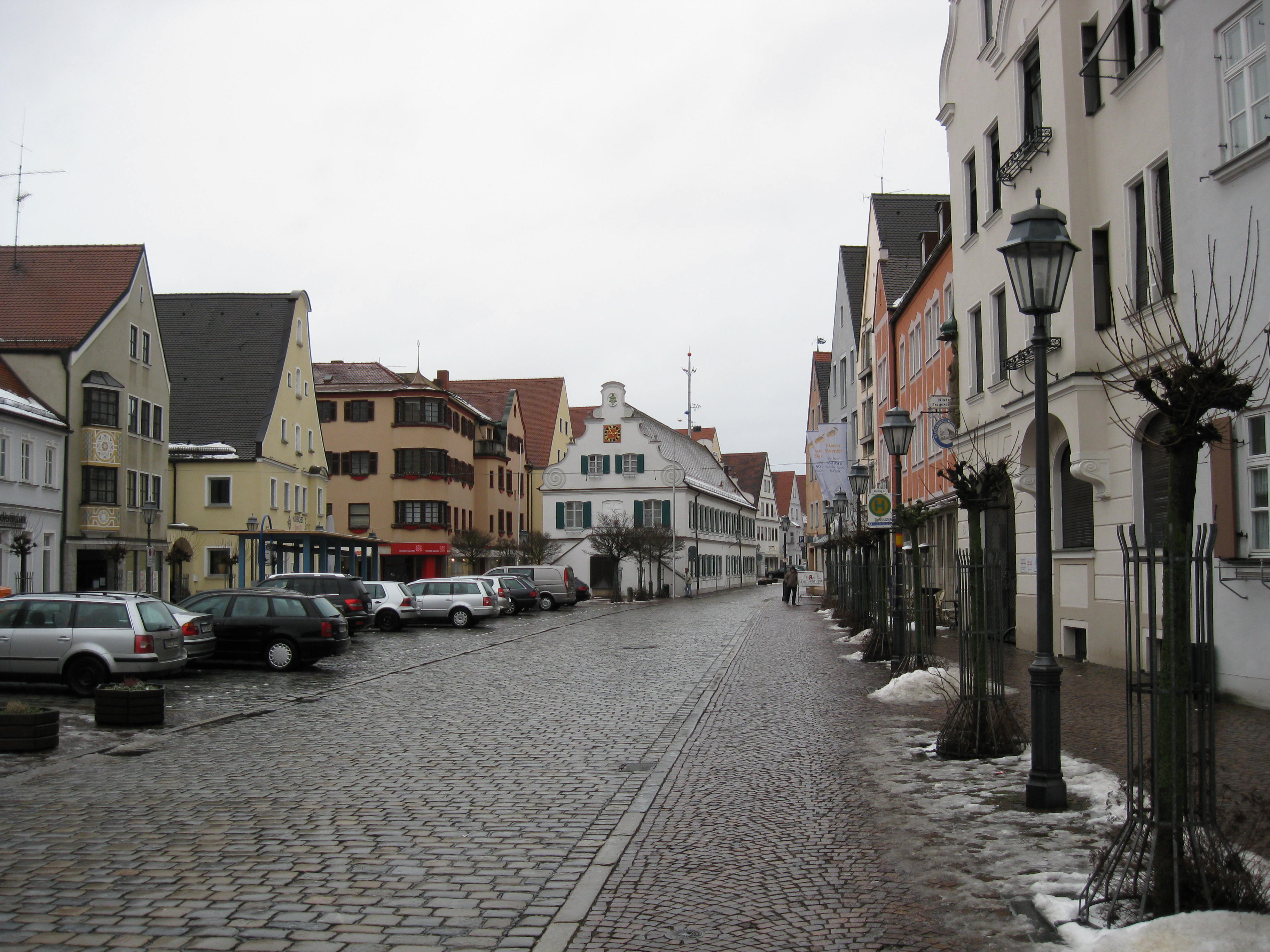 Gebäude in Aichach, Bayern